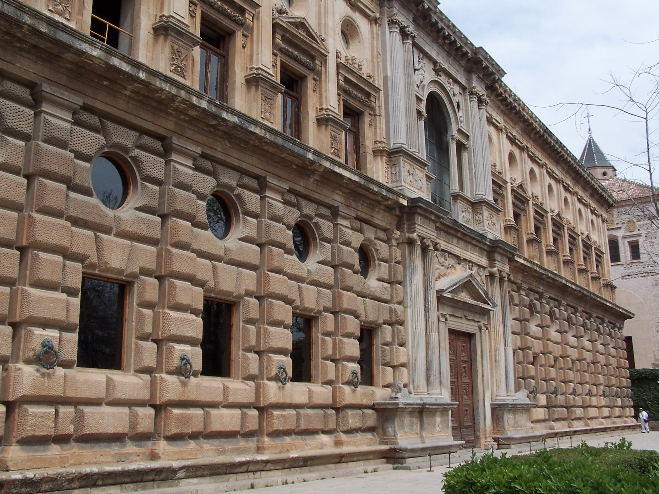 Vista lateral del Palacio de Carlos V situado en el interior de la Alhambra. Alhambra, Granada, España. Notas: Se encuentra situado entre el Palacio Nararí y la Alcazaba.